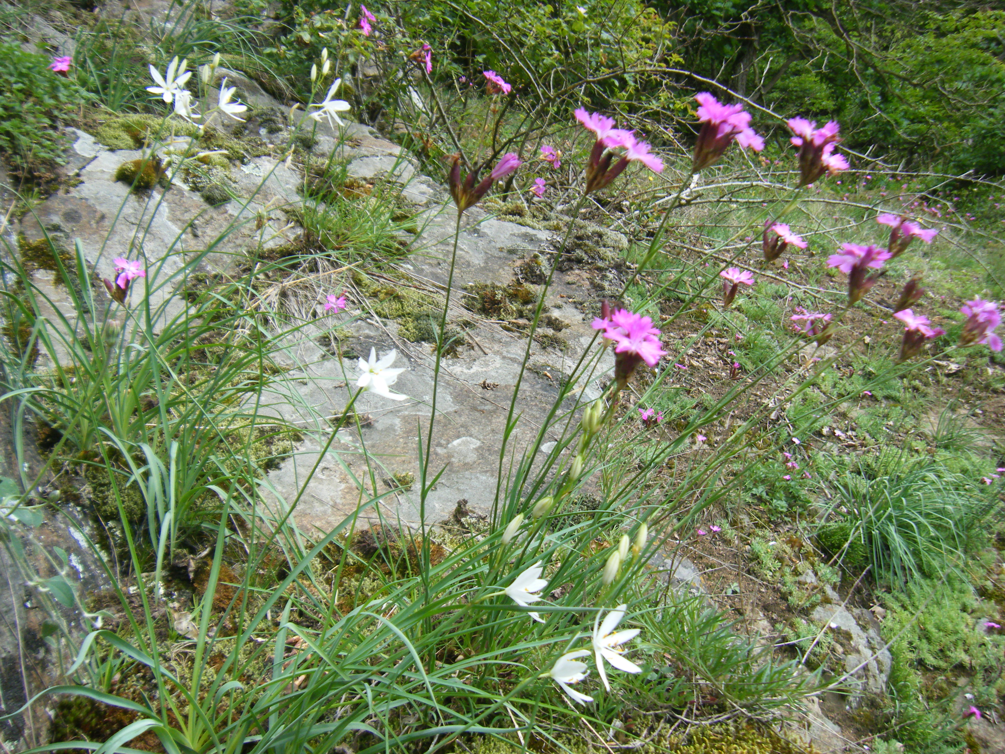 Kartäuser Nelke und ästige Graslilie auf felsigem Magerrasen. Aufgenommen am Herborner Beilstein. Pflanzengemeinschaft am Rande des Licht- und Wärme durchlässigen Eichen-Hainbuchen-Mischwaldes.